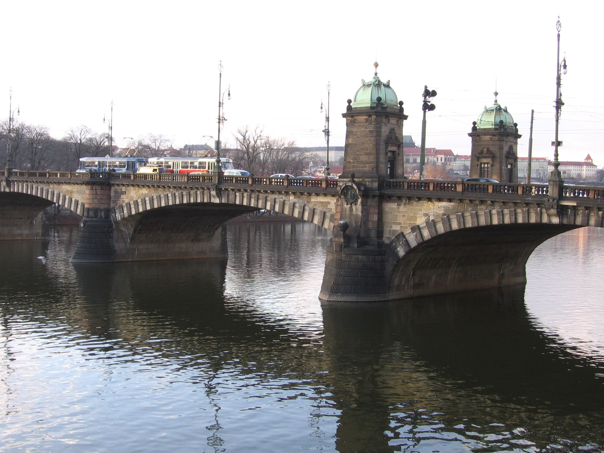 Most Legií, pohled od pravého břehu